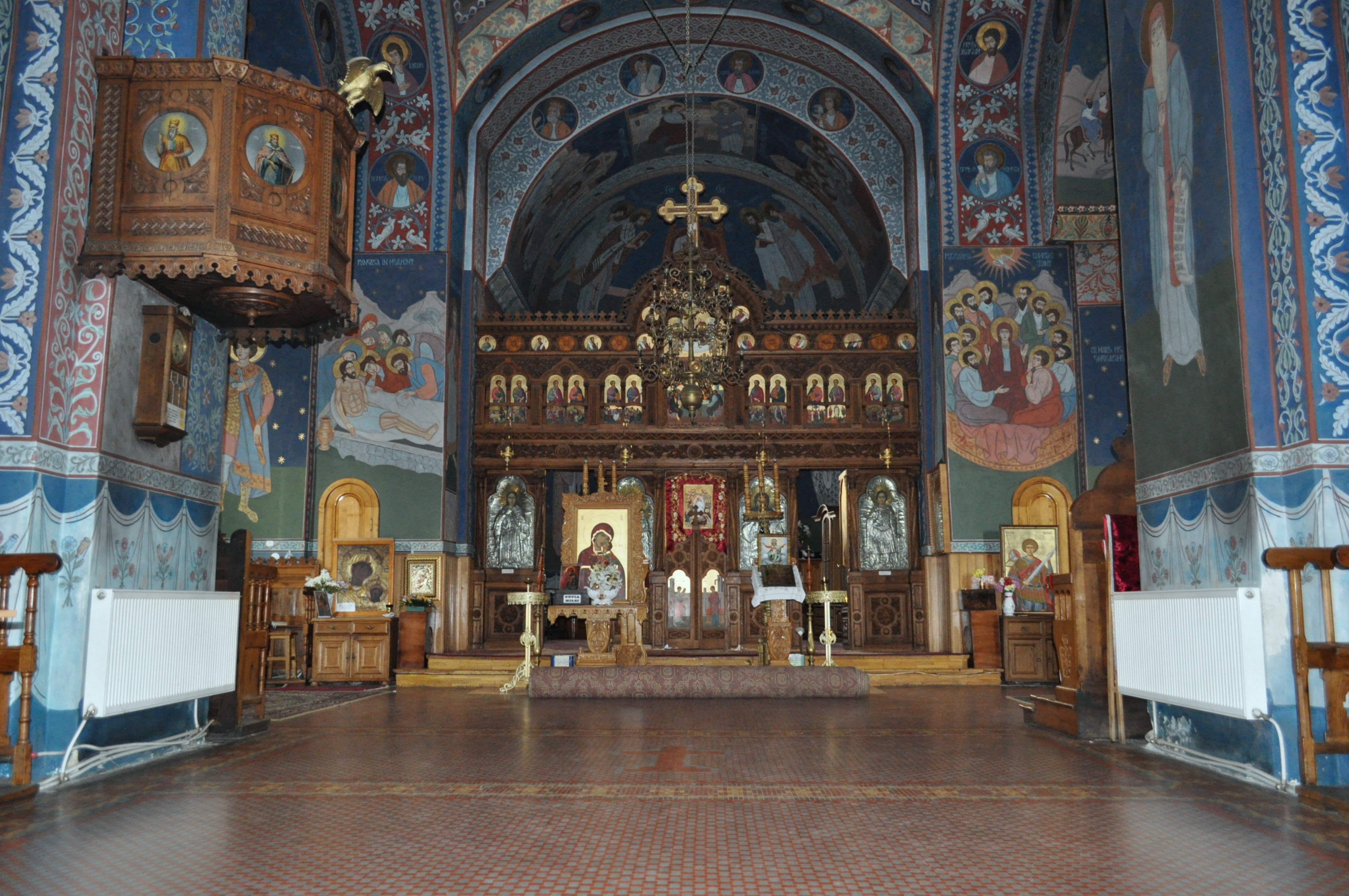 Biserica "Sf. Gheorghe", municipiul Curtea de Argeș, Bd. Basarabilor 91